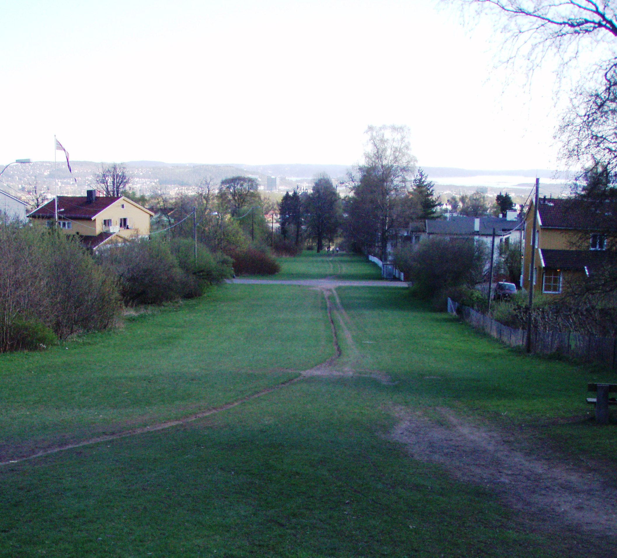 Damefallene. Damefallene sett fra krysset Sognsveien/Carl Kjelsens vei/Kongleveien. Veien midt på bildet er Hamborgveien.